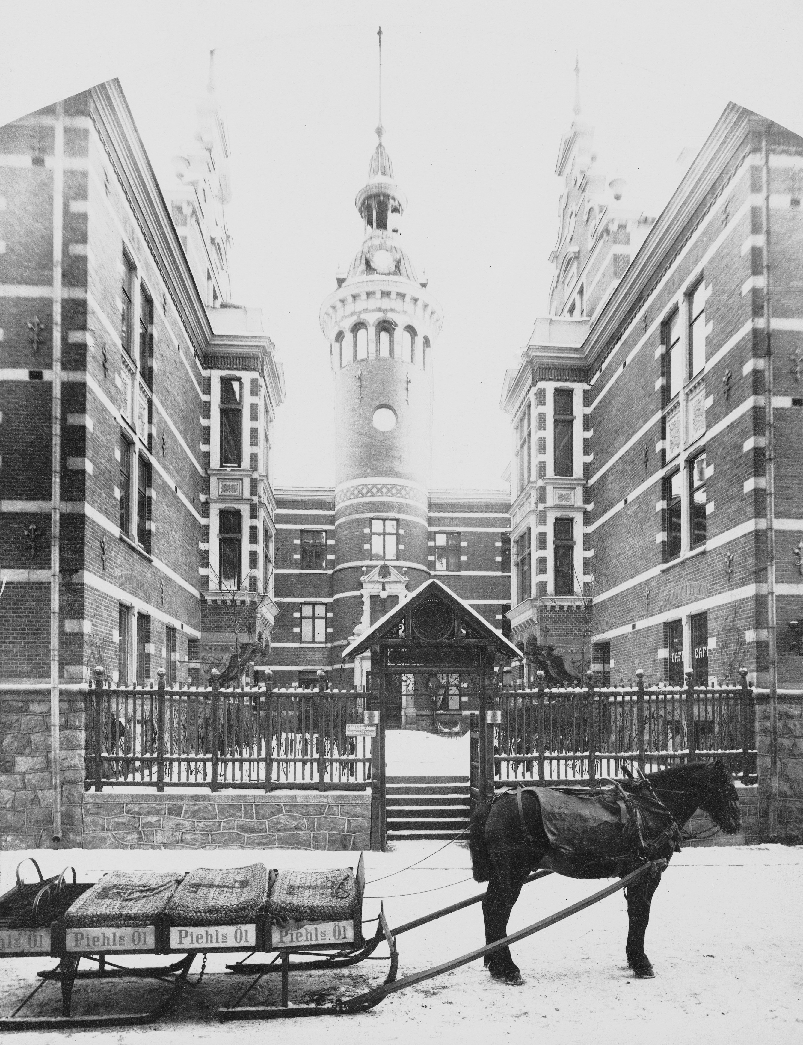 Klara badinrättning vid Gamla Kungsholmsbrogatan 41. Häst med släde från C G Piehls Bryggeri